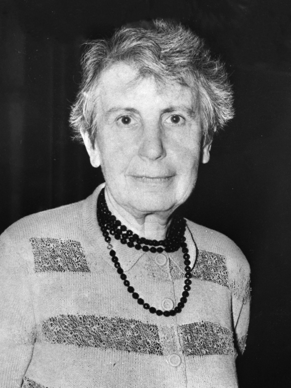 Anna Freud , dochter van Sigmund Freud , psychoanalyticus op Congres te Parijs, 30-7-1957